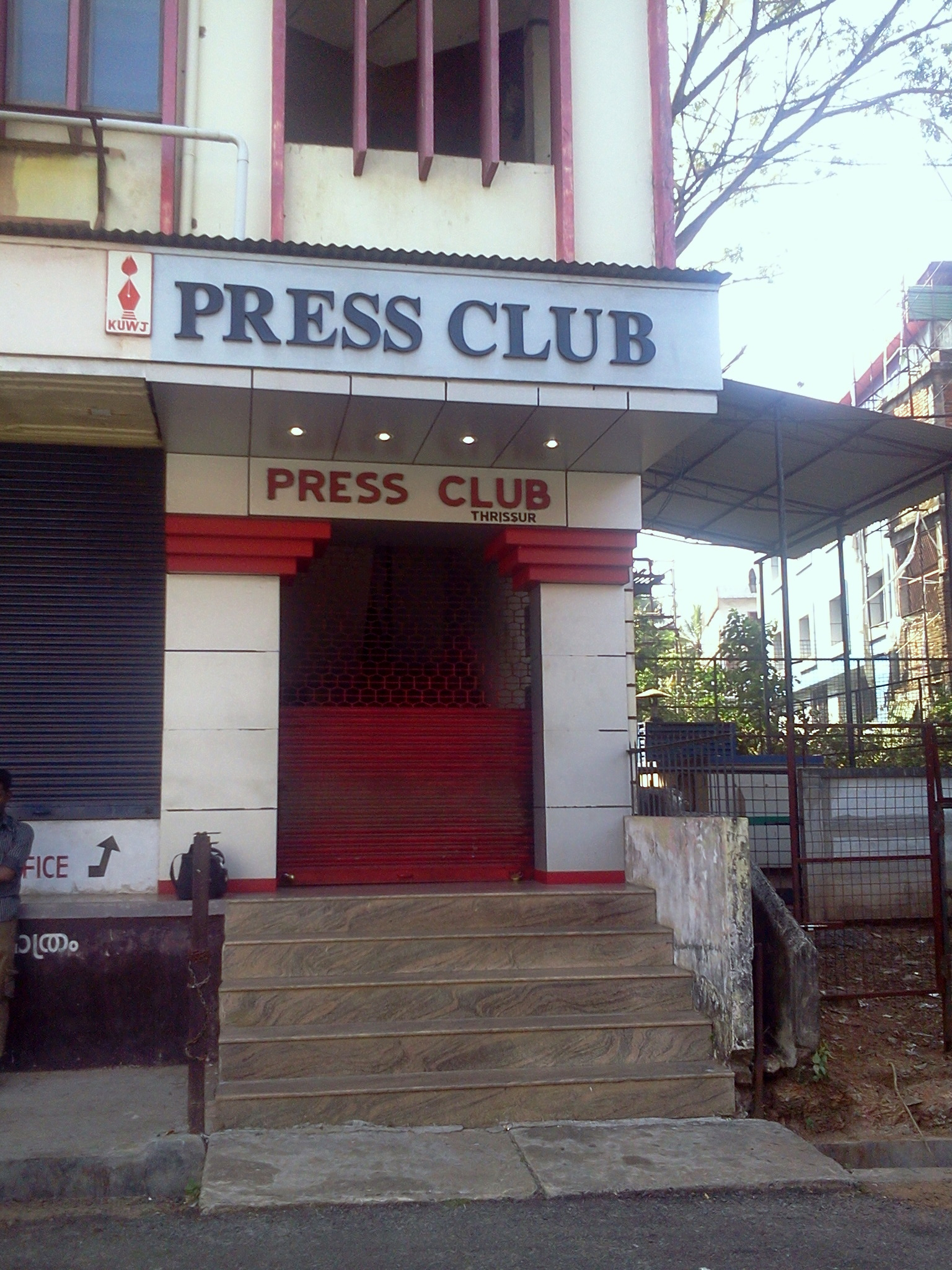 പ്രസ്സ് ക്ലബ് തൃശ്ശൂര്‍